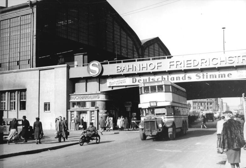 ADN-ZB Schmidtke Me-Schä 15.10.1951 Berlin 1951 UBz: Die Friedrichstraße im Stadtzentrum. Blick auf den S-Bahnhof Friedrichstraße.